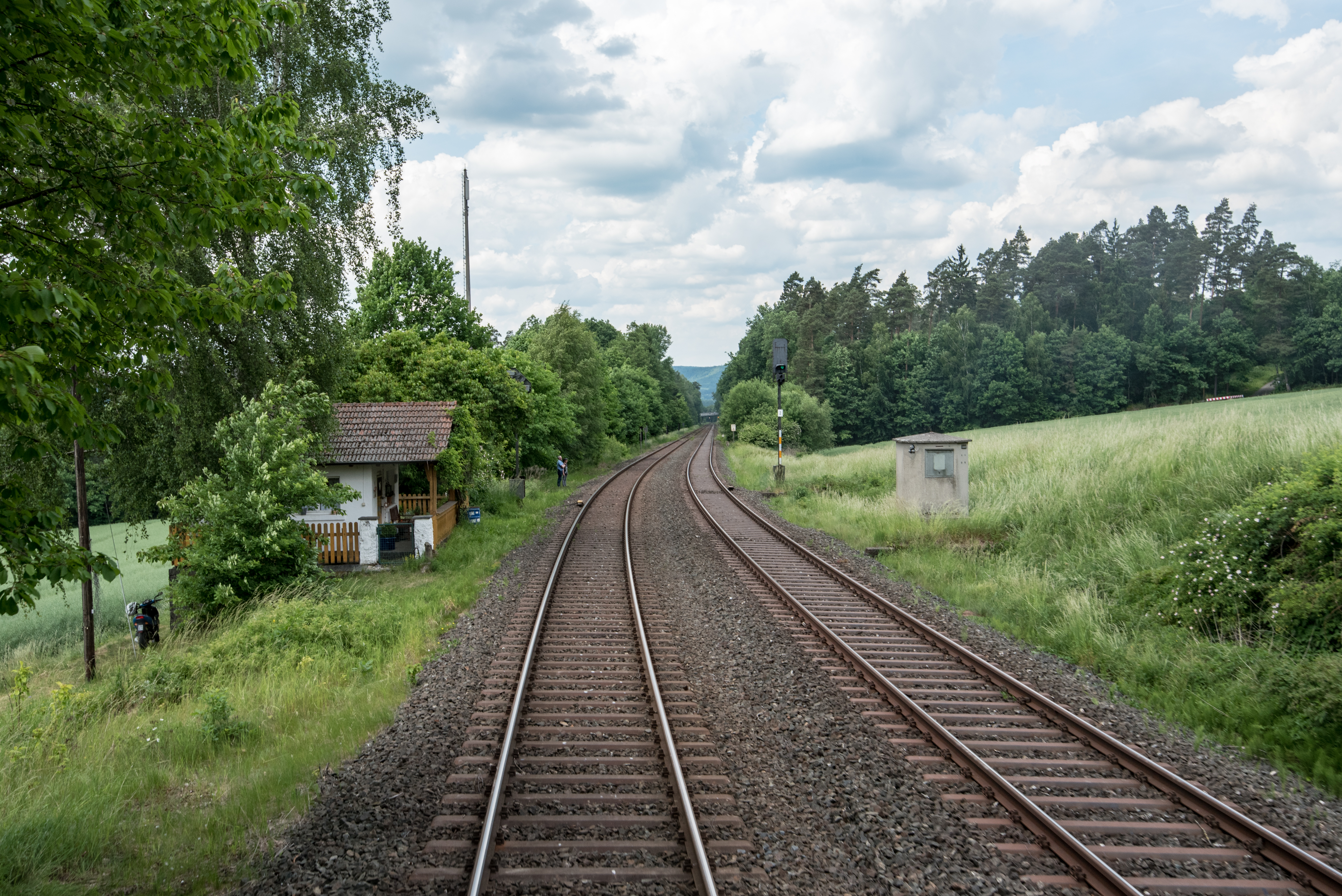 Schiefe Ebene, von Neuenmarkt-Wirsberg nach Marktschorgast